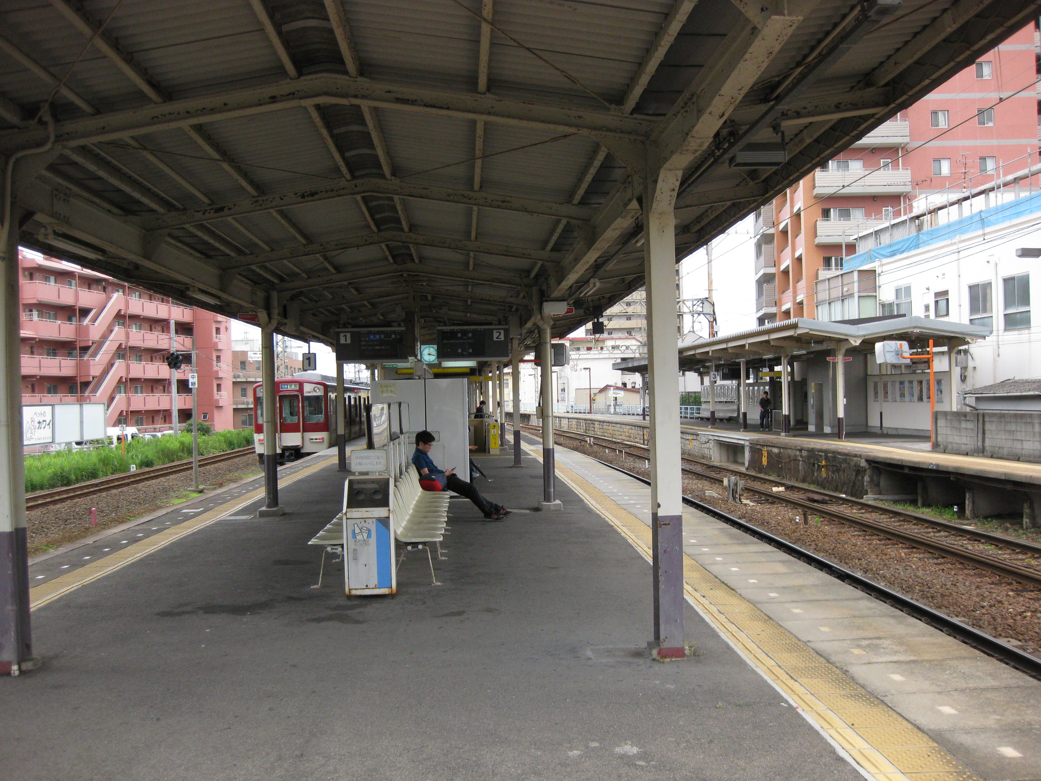 津新町駅プラットホーム